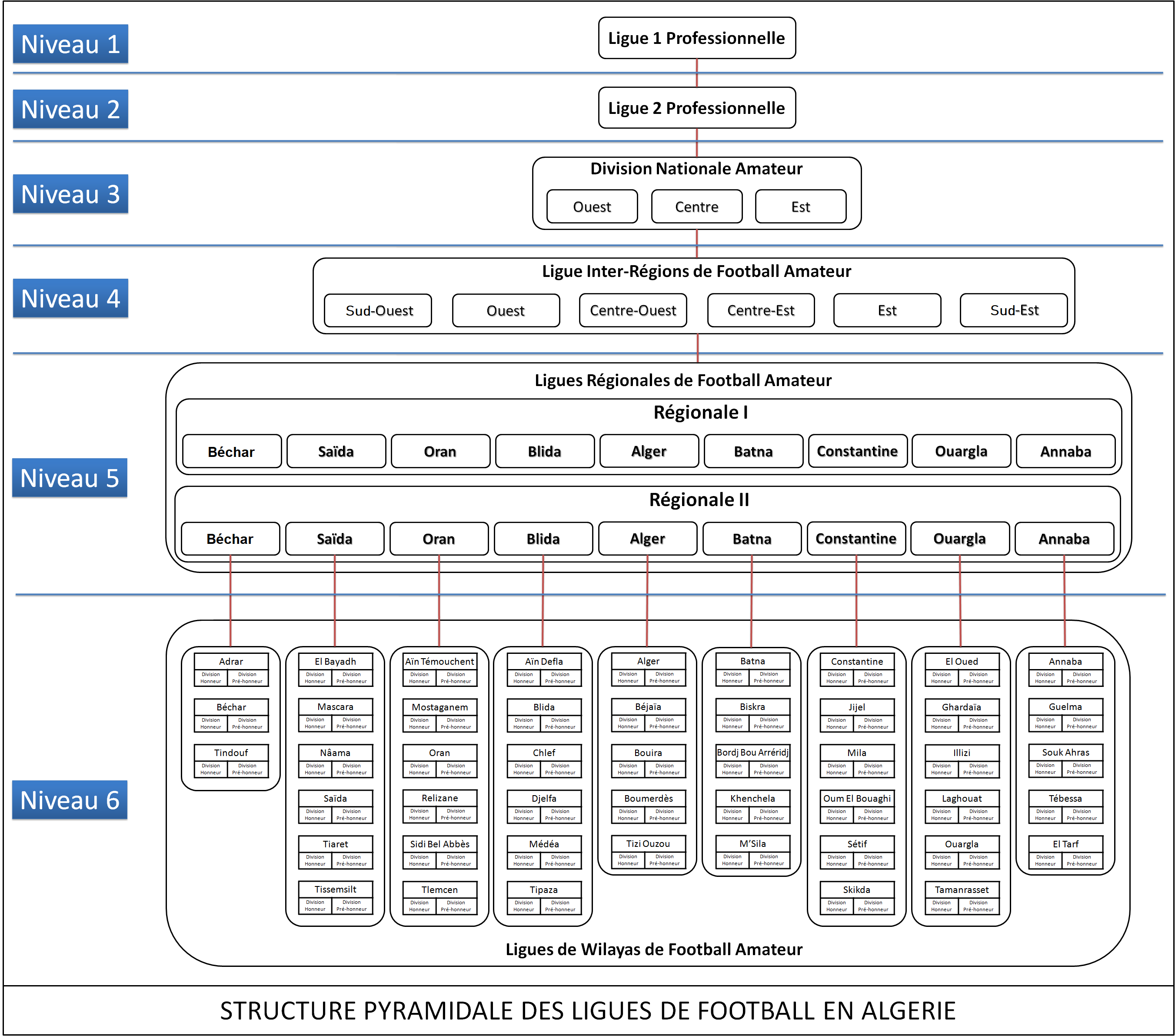 Structure pyramidale des ligues de football en Algérie